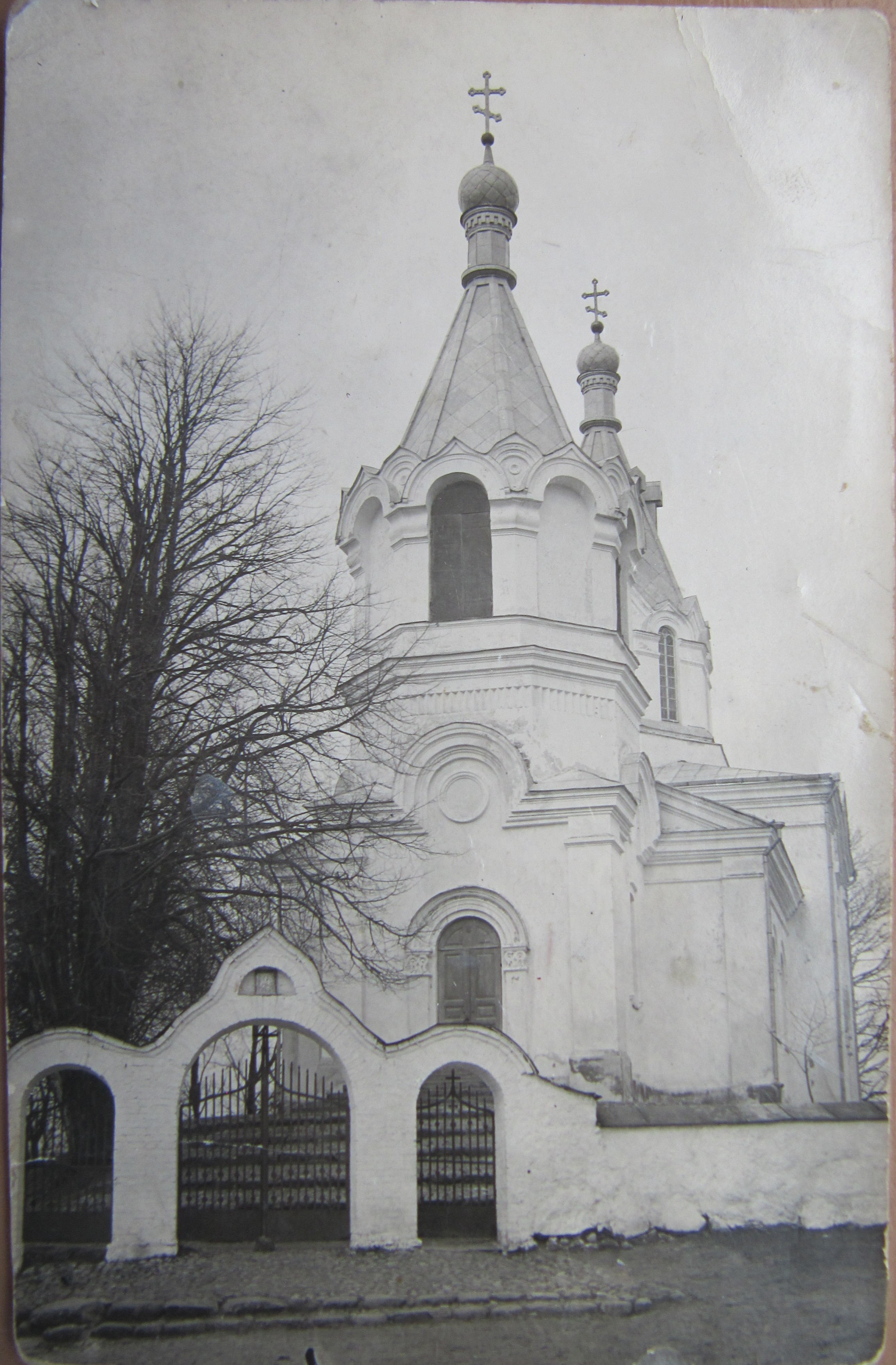 Беларуская (тарашкевіца): Куранец (Kuraniec). :be-tarask:Царква Раства Багародзіцы (Куранец) |Царква -мураўёўка